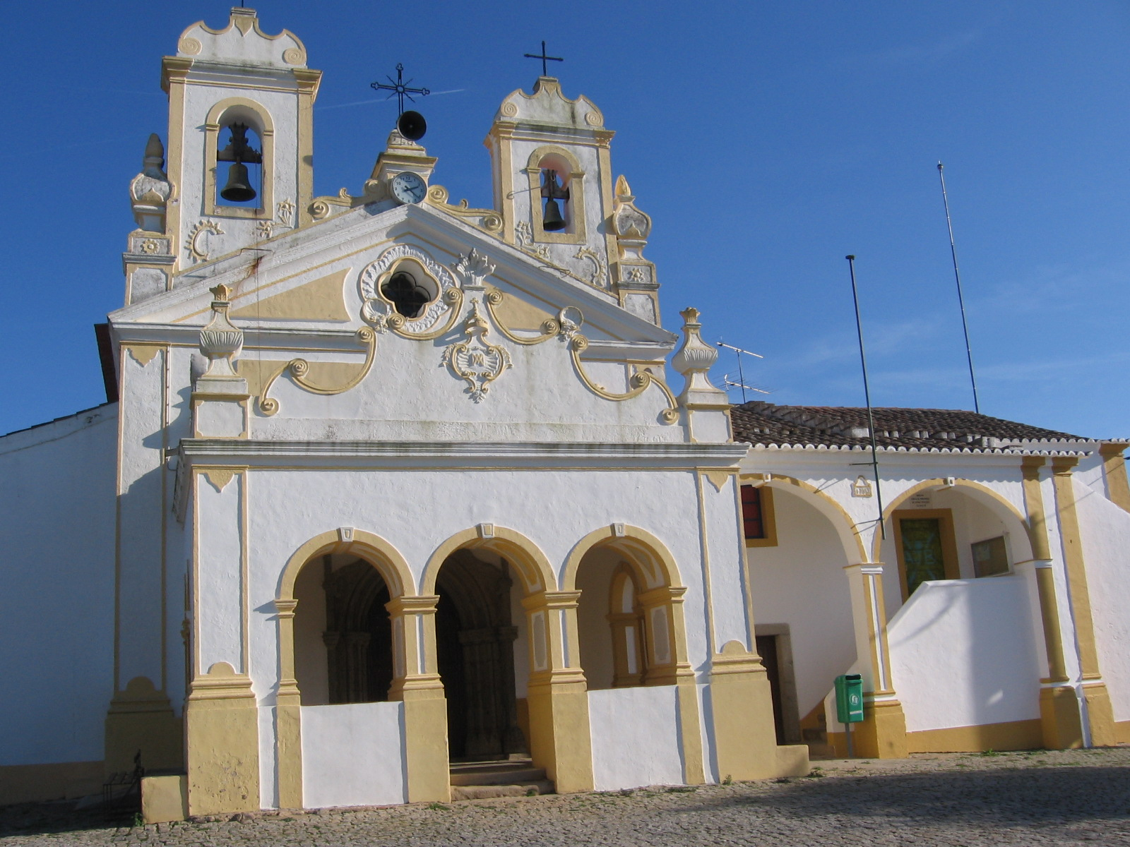 Igreja de Nossa Senhora da Boa Fé, Évora, Portugal